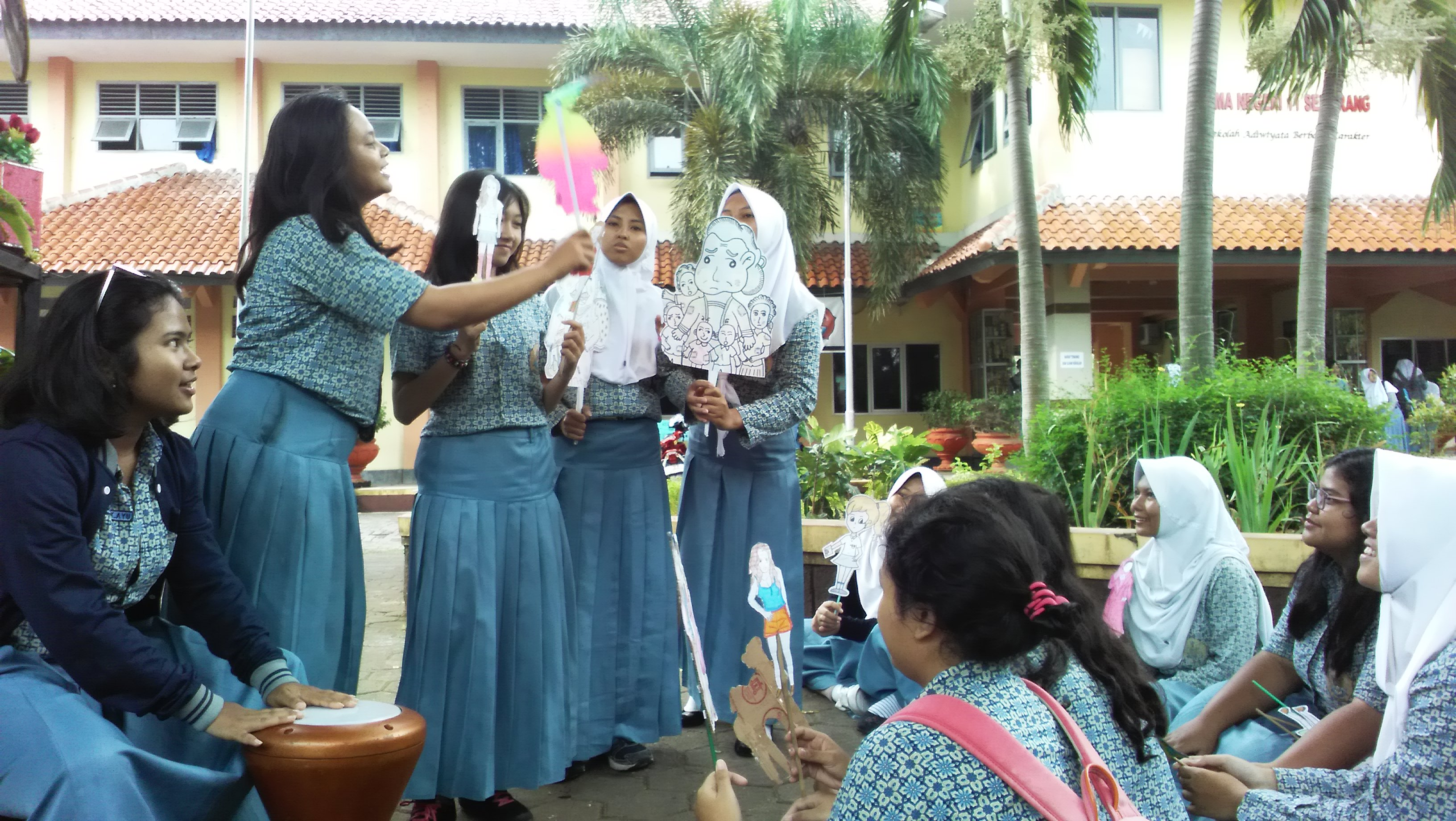 dr